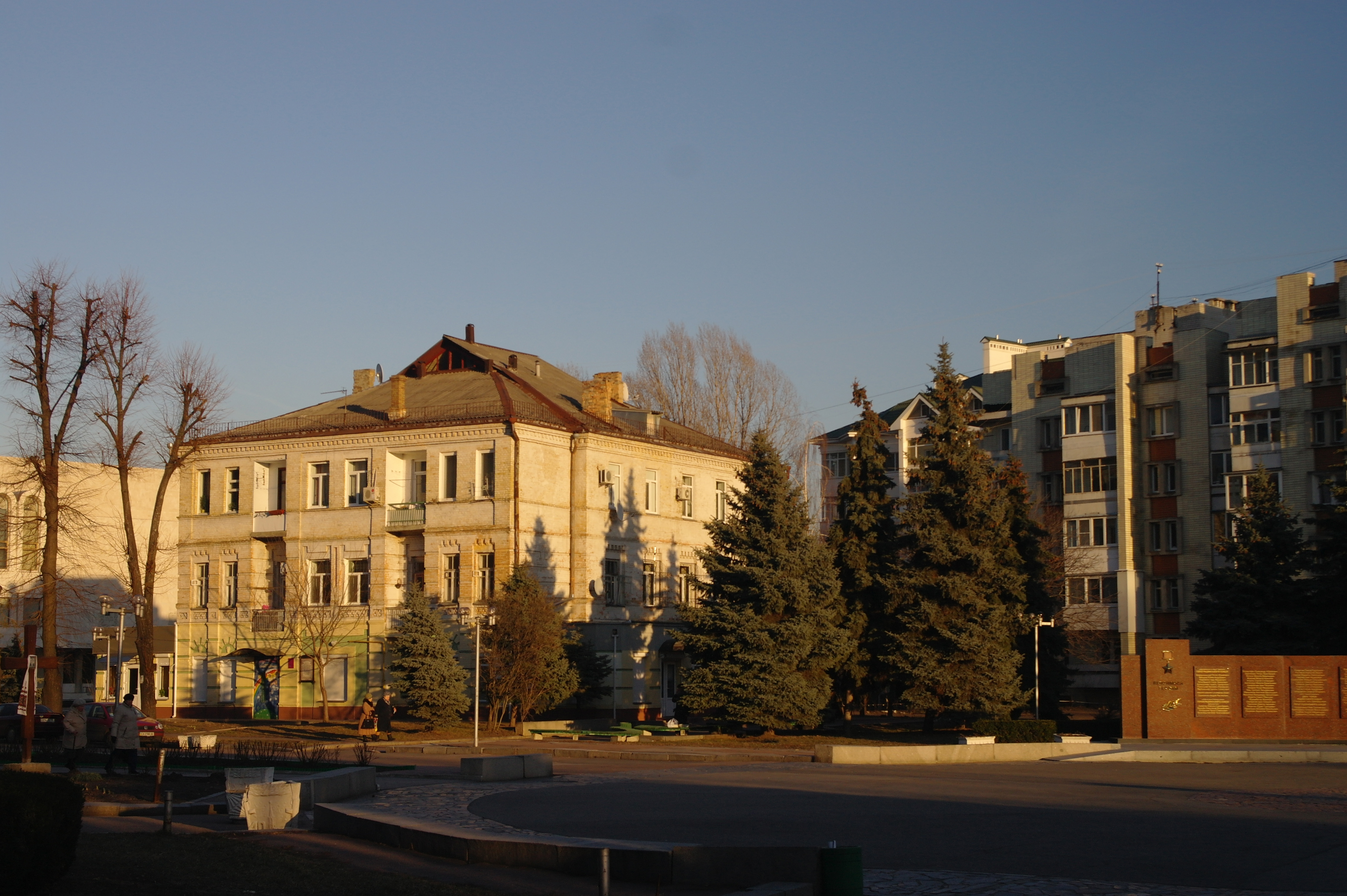 Черкаси, синагога